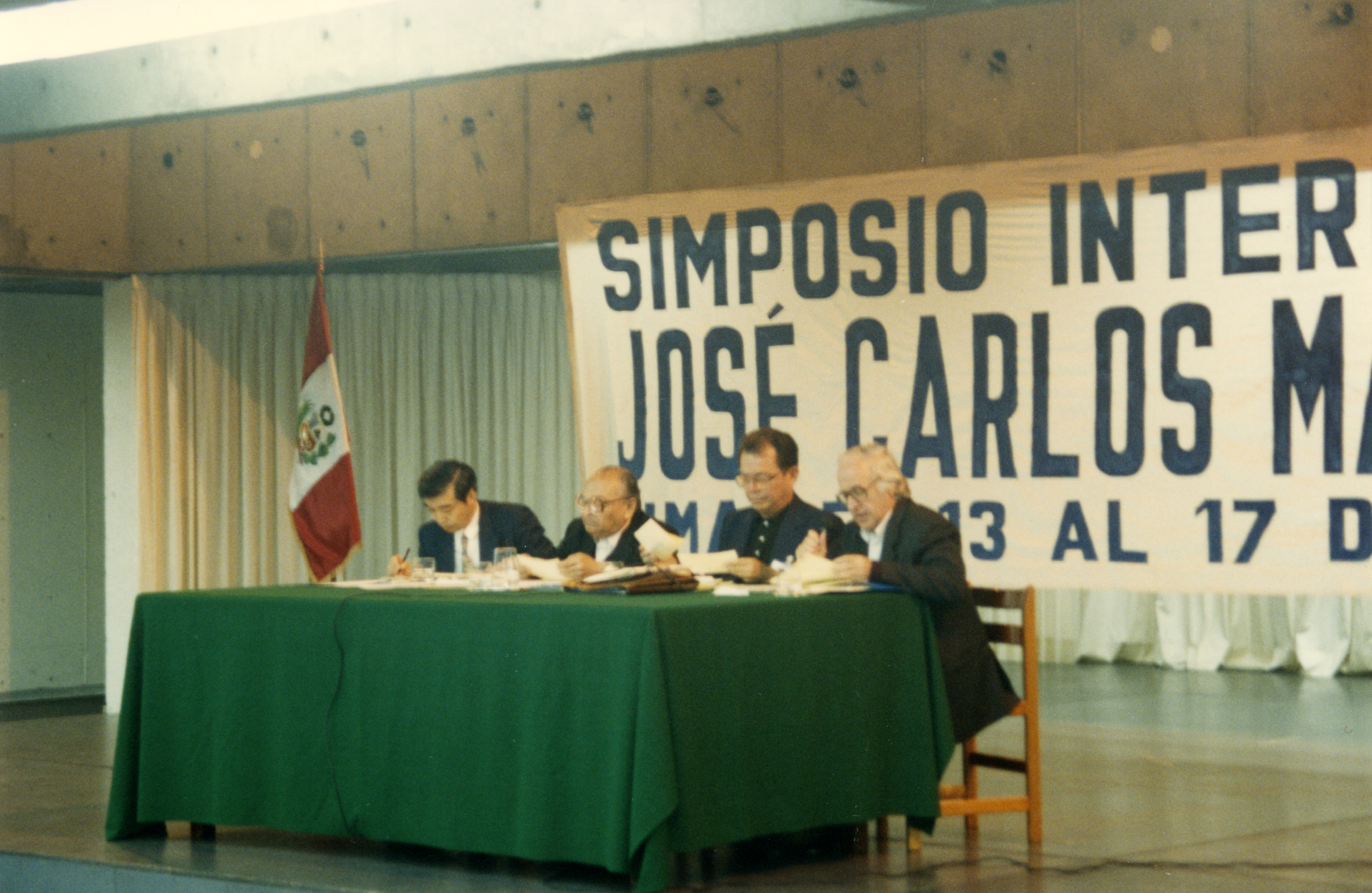 Tomada durante el Simposio Internacional por el Centenario del Nacimiento de José Carlos Mariátegui, Lima, 1994. En la imagen: Toyoharu Tsuji, Gustavo Gutierrez, Ernesto Yepes y Antonio Melis.